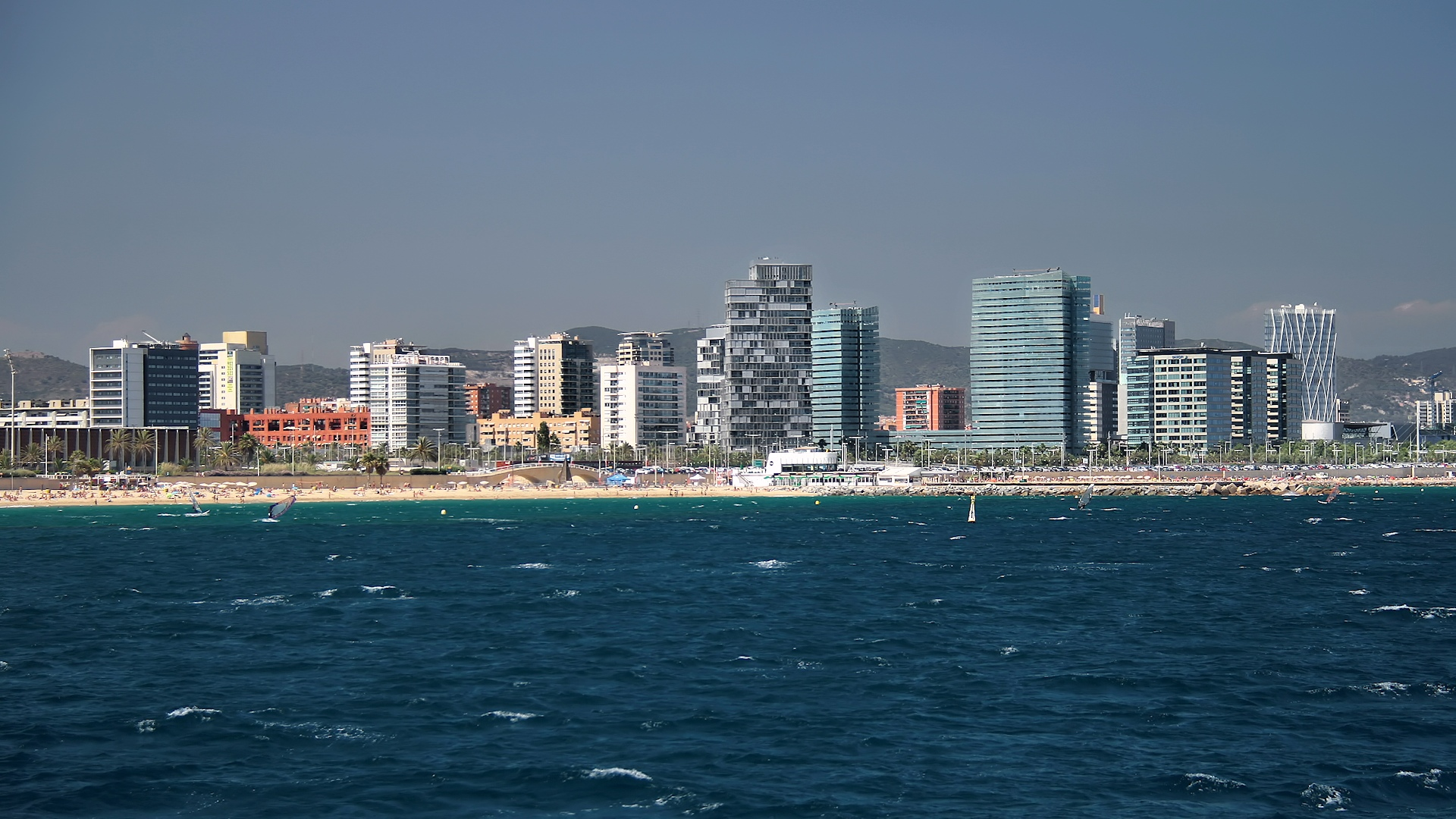 Barcelona desde el mar